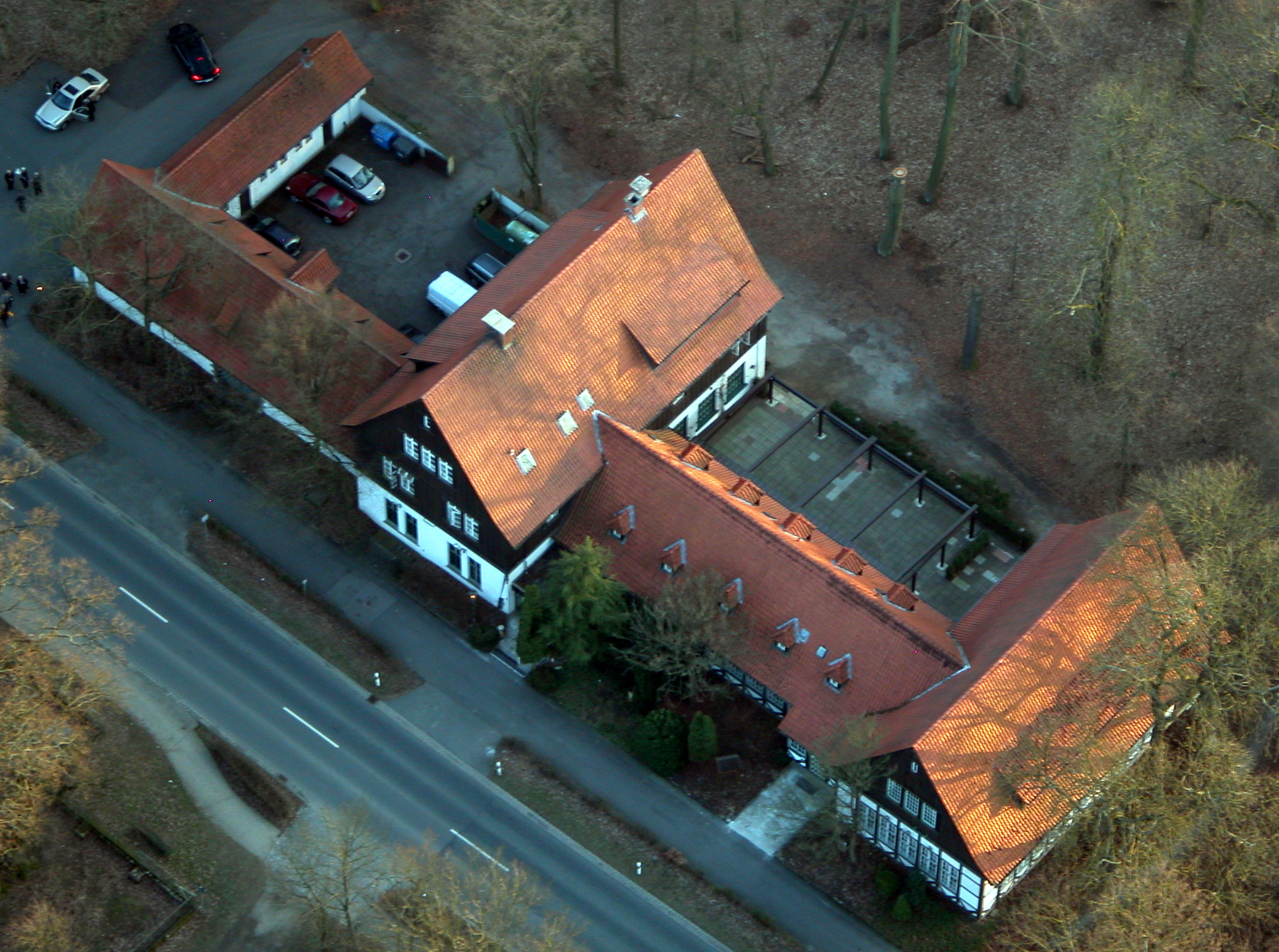 Braunschweig, Luftaufnahme des „Grünen Jägers“ (Hauptgebäude) an der Ebertallee in Riddagshausen.